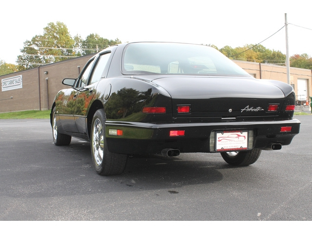 Rear view of 1991 Avanti II 4-door sedan.